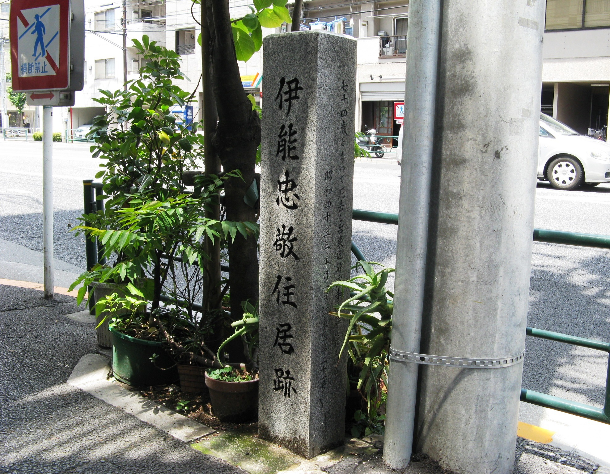 伊能忠敬が江戸に出てきたときに住んでいた場所。深川黒江町。